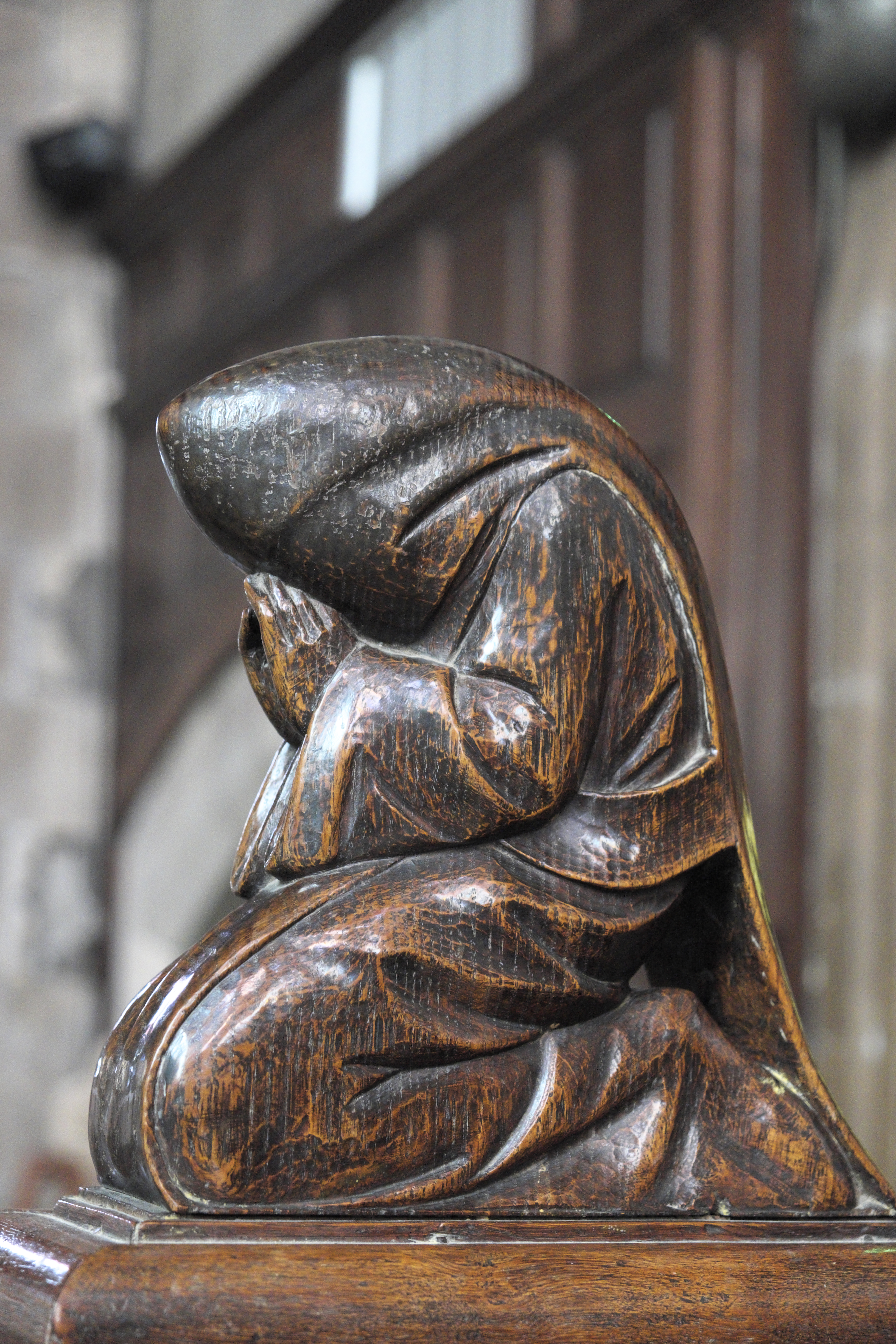 Basilika Notre-Dame-de-l'Assomption in La Guerche-de-Bretagne im Département Ille-et-Vilaine (Bretagne/Frankreich), Skulptur des Chorgestühls: Betender Mönch